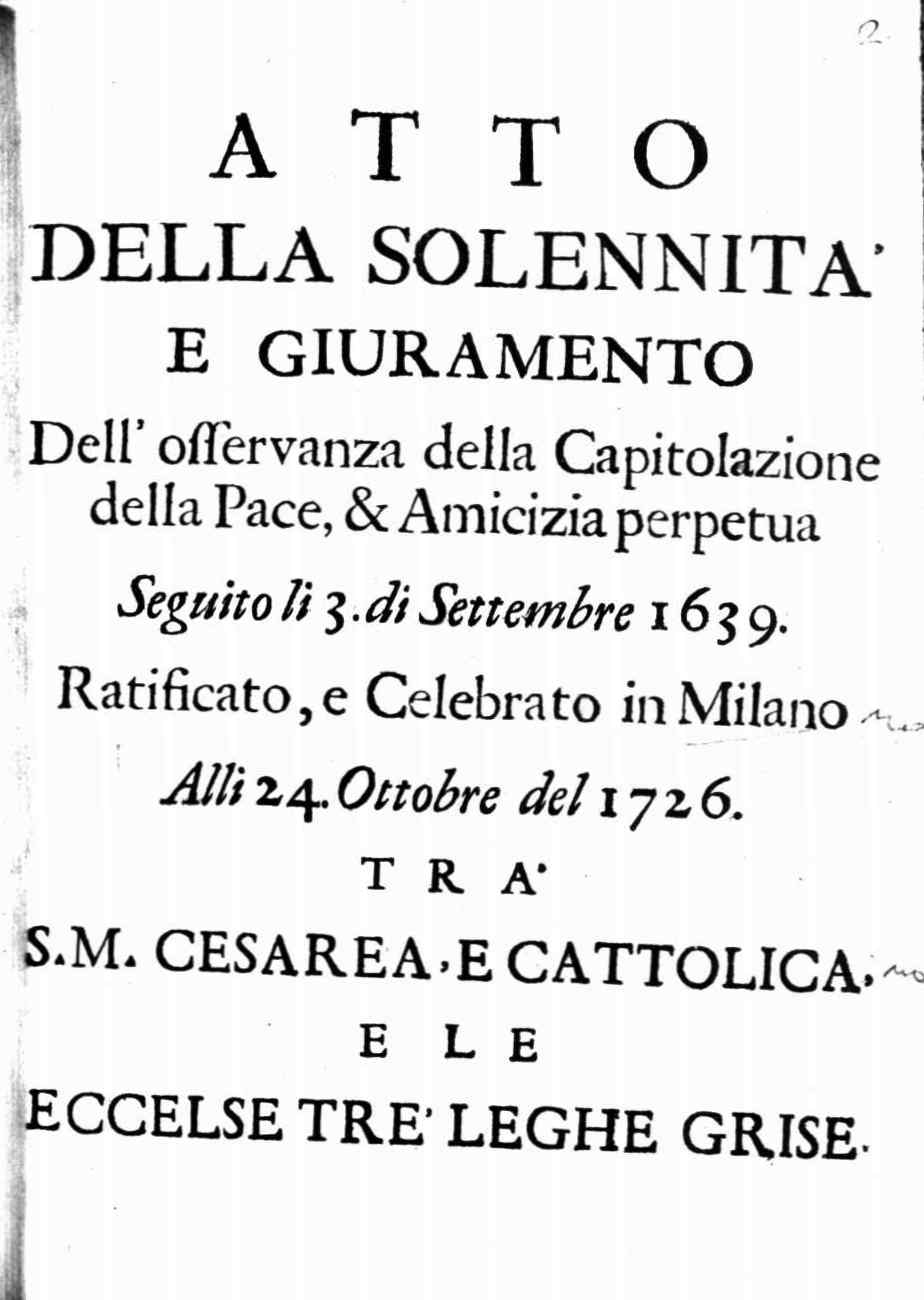 Frontespizio